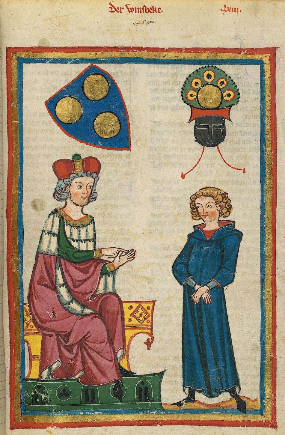 Codex Manesse, UB Heidelberg, Cod. Pal. germ. 848, fol. 213r, Der Winsbeke